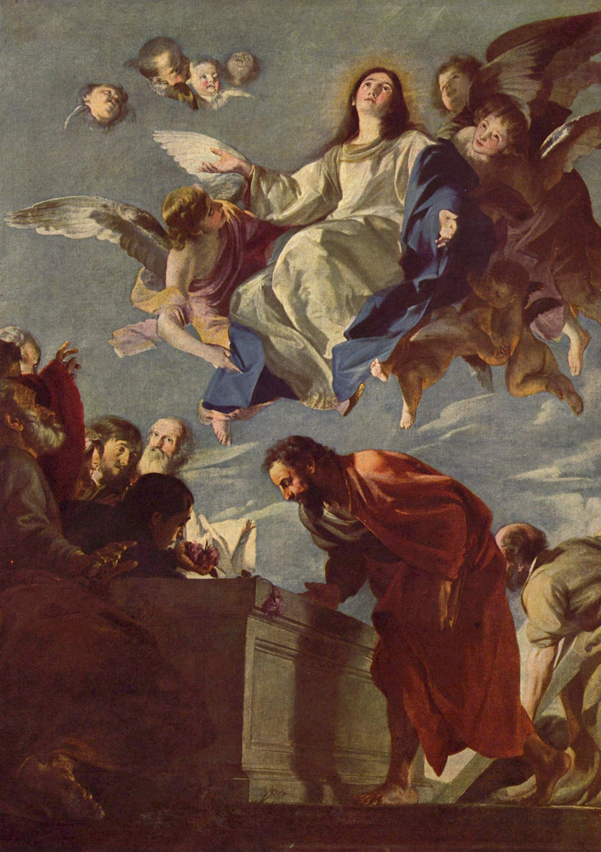 La obra representa la asunción de la Virgen María en cuerpo y alma a los Cielos.